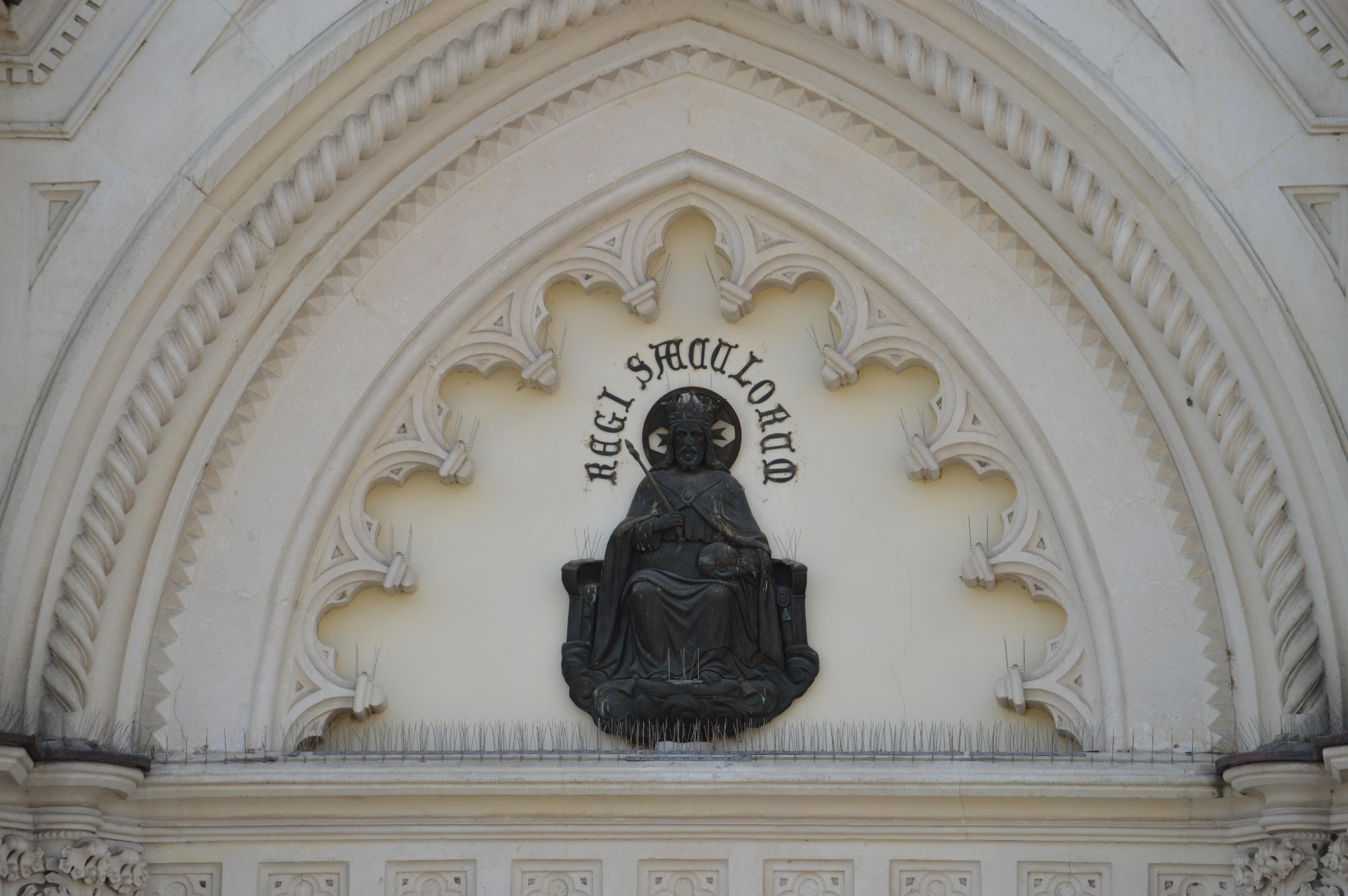 Timpano della porta principale della chiesa di San Vitale e Castelnovo di Isola Vicentina, in provincia di Vicenza, accogliente un altorilievo in rame battuto placcato in oro e bronzo che rappresenta Gesù seduto in trono con un globo nella mano sinistra e scritta sovrastante.